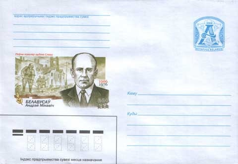 Конверт с маркой Республики Беларусь. Поўны кавалер ордэна Славы. Белавусаў Андрэй Мінавіч. 1906-1976.